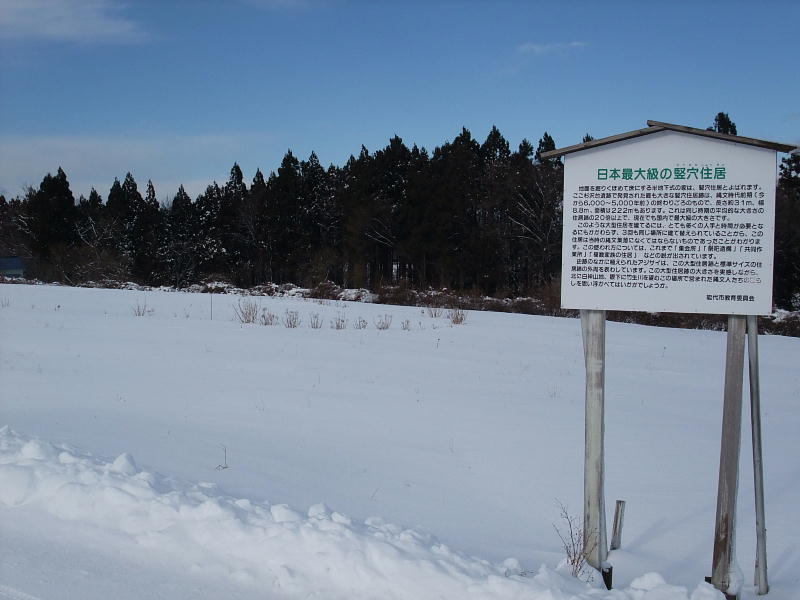 雪の杉沢台遺跡 Sugisawadai Iseki, Noshiro, Akita, Japan